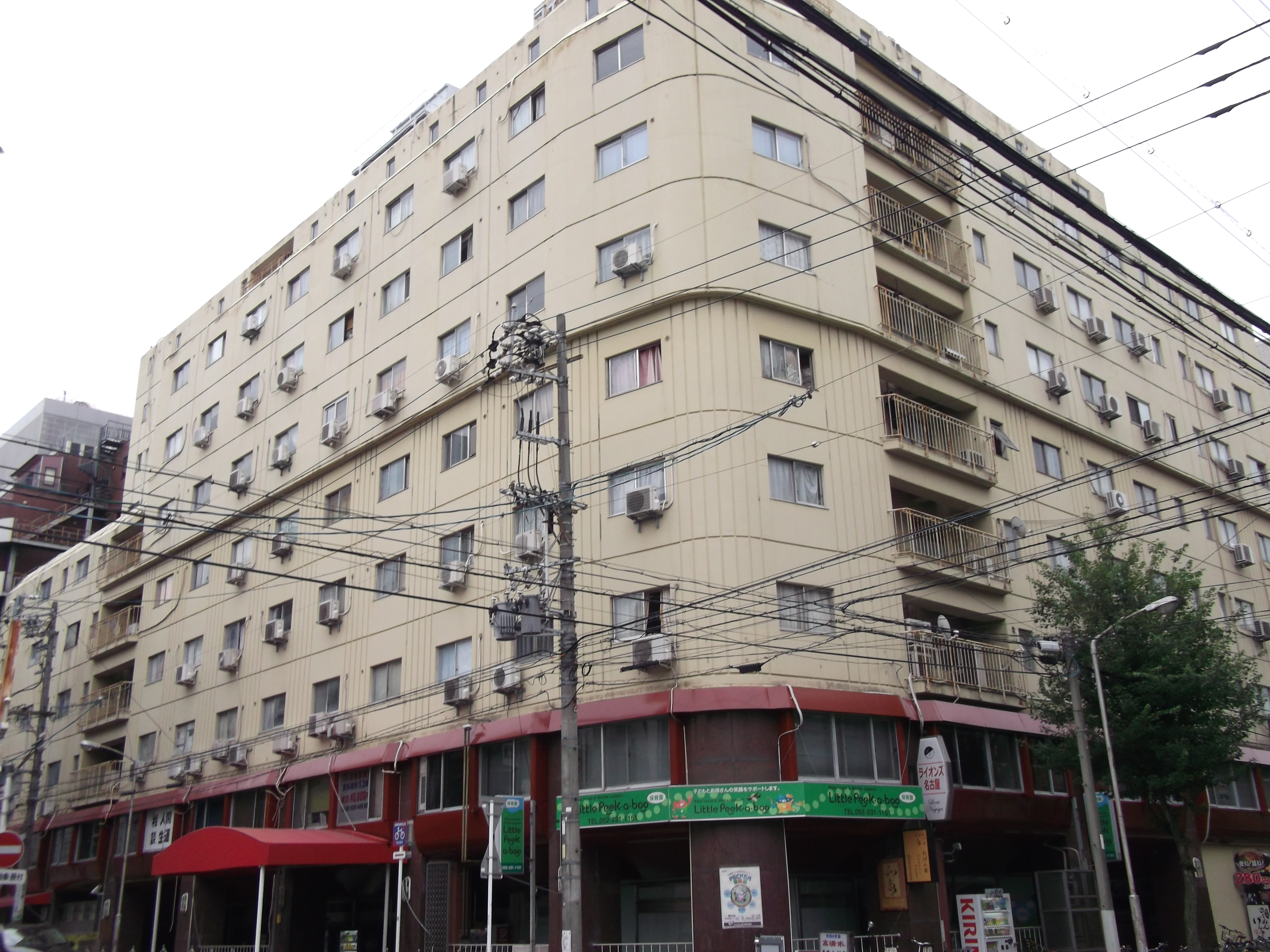 名古屋市中区栄一丁目のライオンズホテル名古屋を北西側から撮影